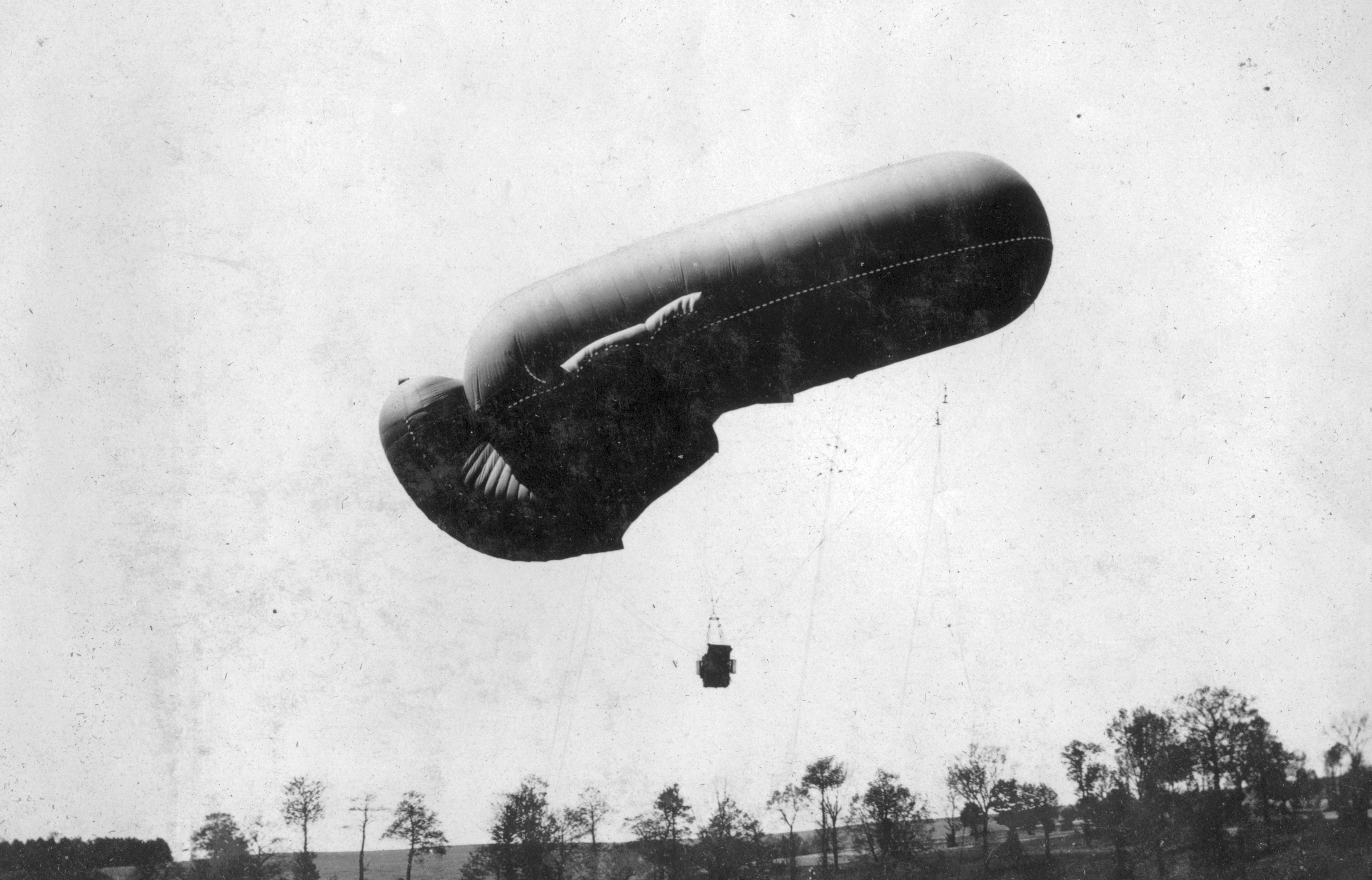 A K. u. K. hadsereg Drachen típusú rögzített megfigyelő léggömbje. Tags: air-ship Title: A K. u. K. hadsereg Drachen típusú rögzített megfigyelő léggömbje.